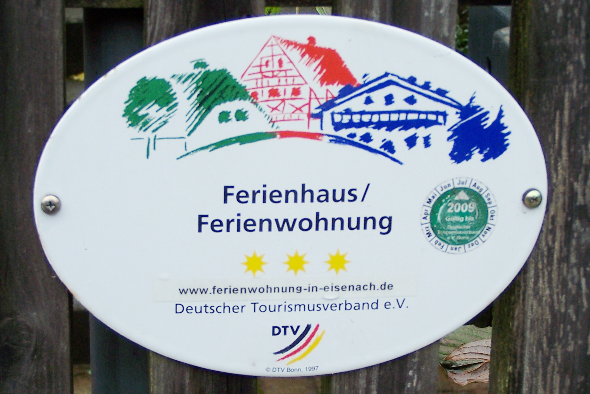 Plakette zur Kennzeichnung von (zertifizierten) Ferienhäusern des Deutschen Tourismusverbandes.